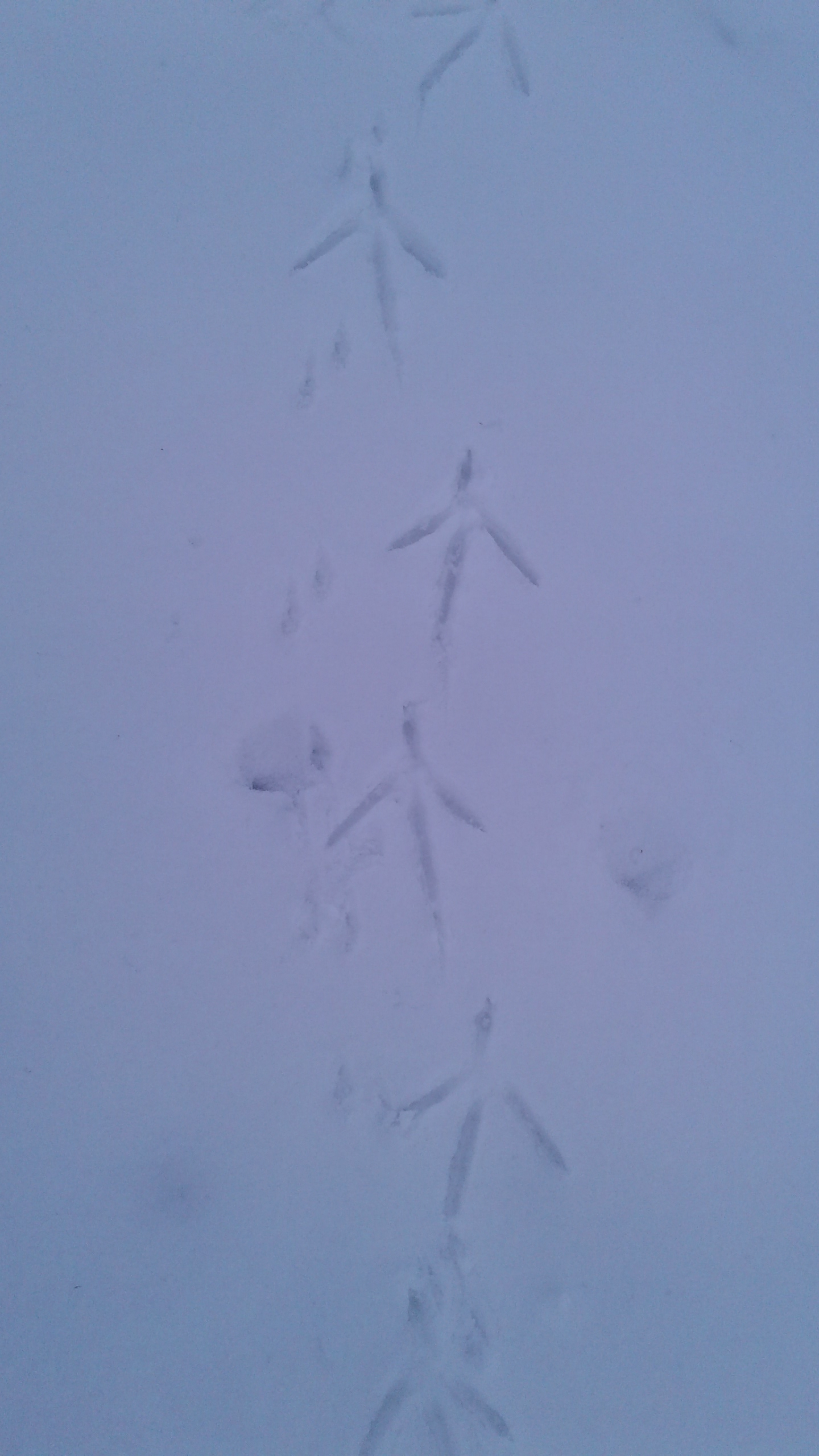 Сліди Чепури у плавнях Південного Бугу